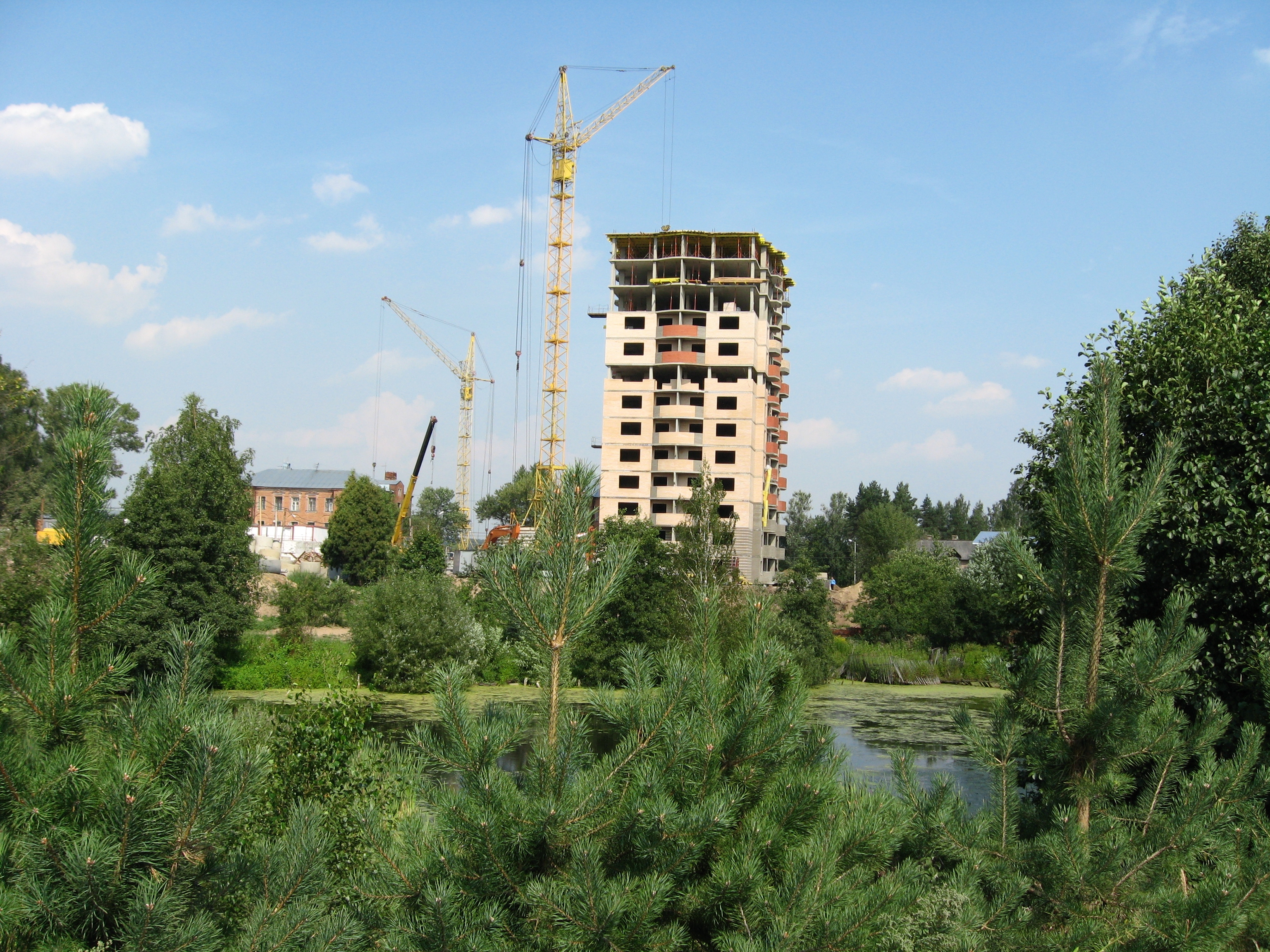 свердловка